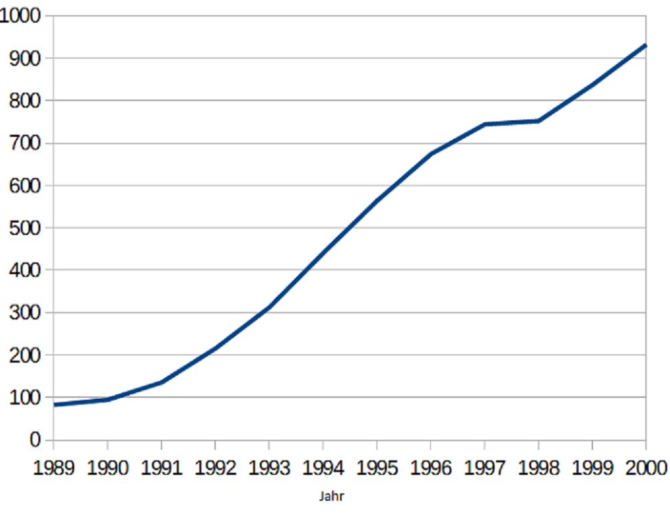 Mitgliederentwicklung der Jüdischen Gemeinde Kassel von 1998-2000